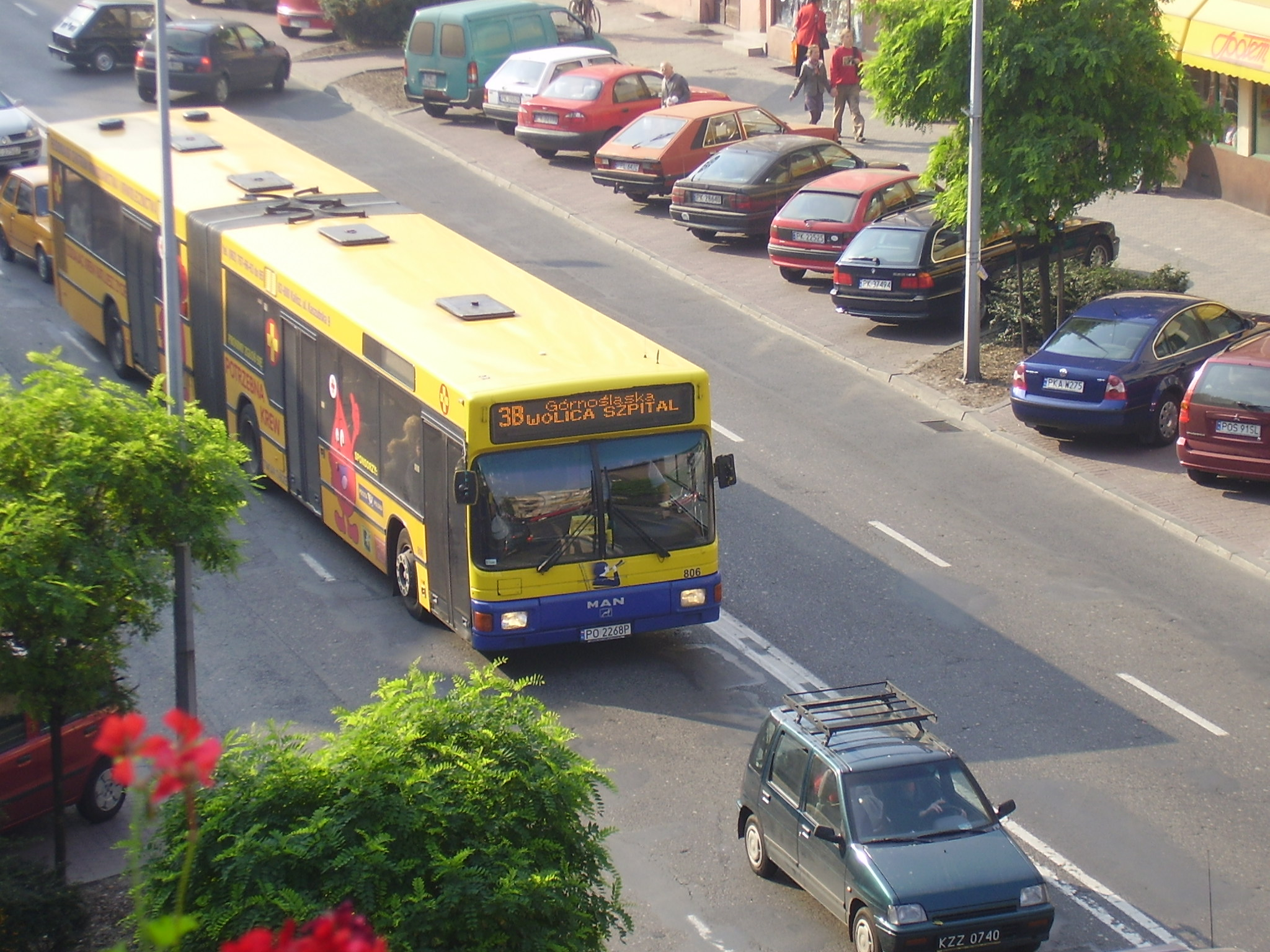 MAN NG 272 Kaliskich Linii Autobusowych na ul. Górnośląskiej w Kaliszu